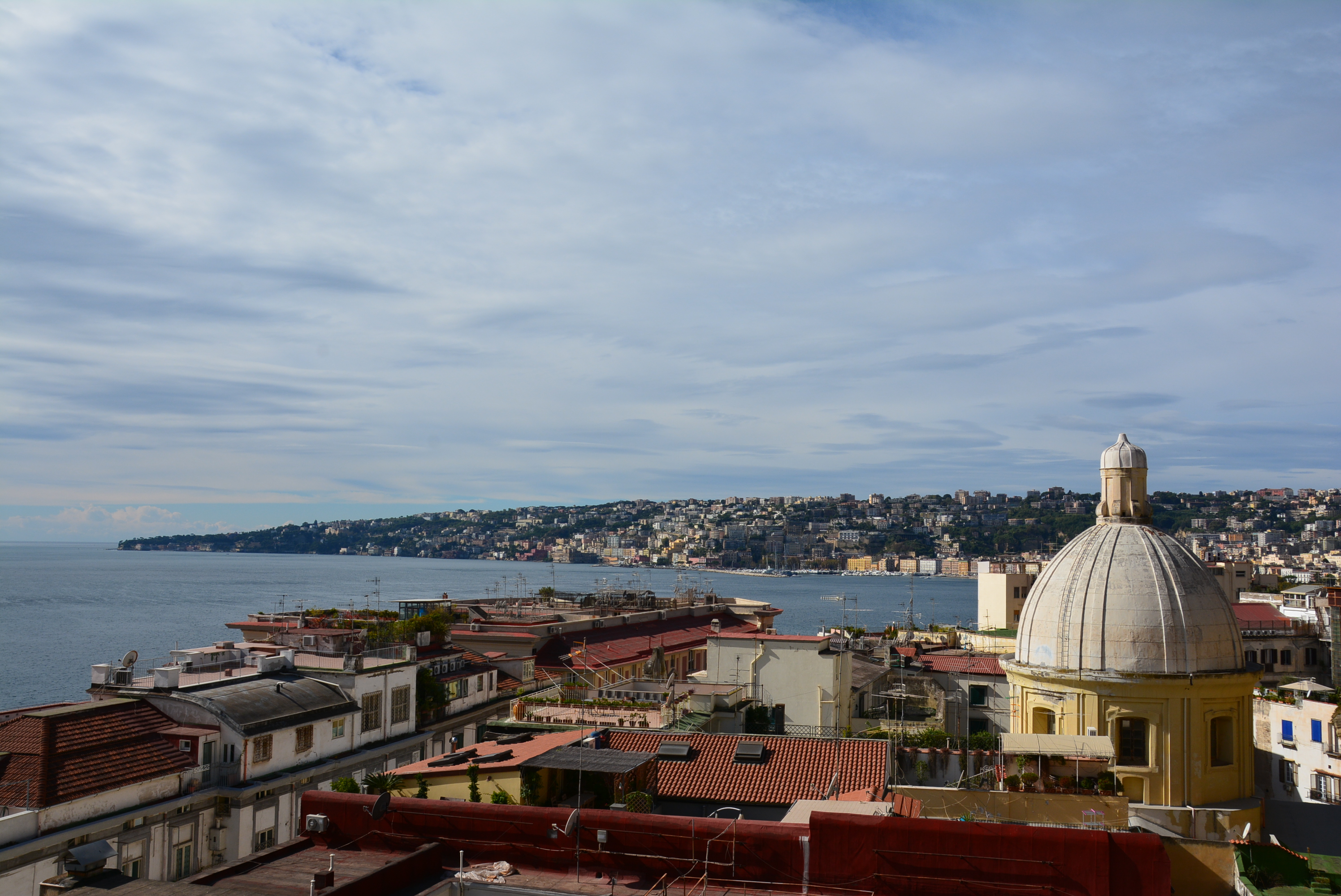 Veduta di Napoli da Pizzofalcone